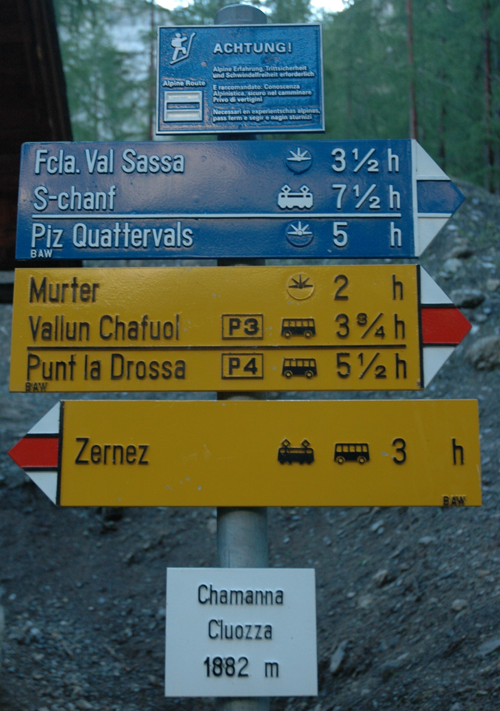 Die Wanderungen von Chamanna Cluozza, einer Wanderhütte im Herzen des Schweizerischen Nationalparks.